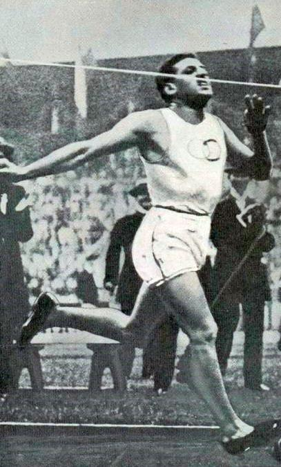 Jean Bouin vice-champion olympique du 5000 mètres en 1912